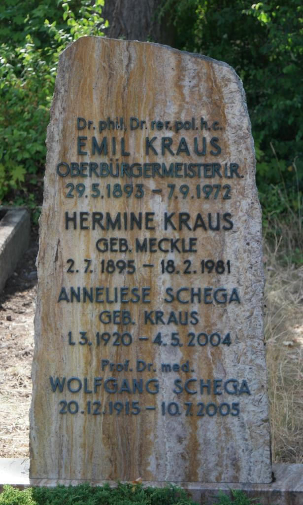 Grab des Mainzer Lokalpolitikers Emil Kraus, 1893-1972, auf dem Hauptfriedhof Mainz